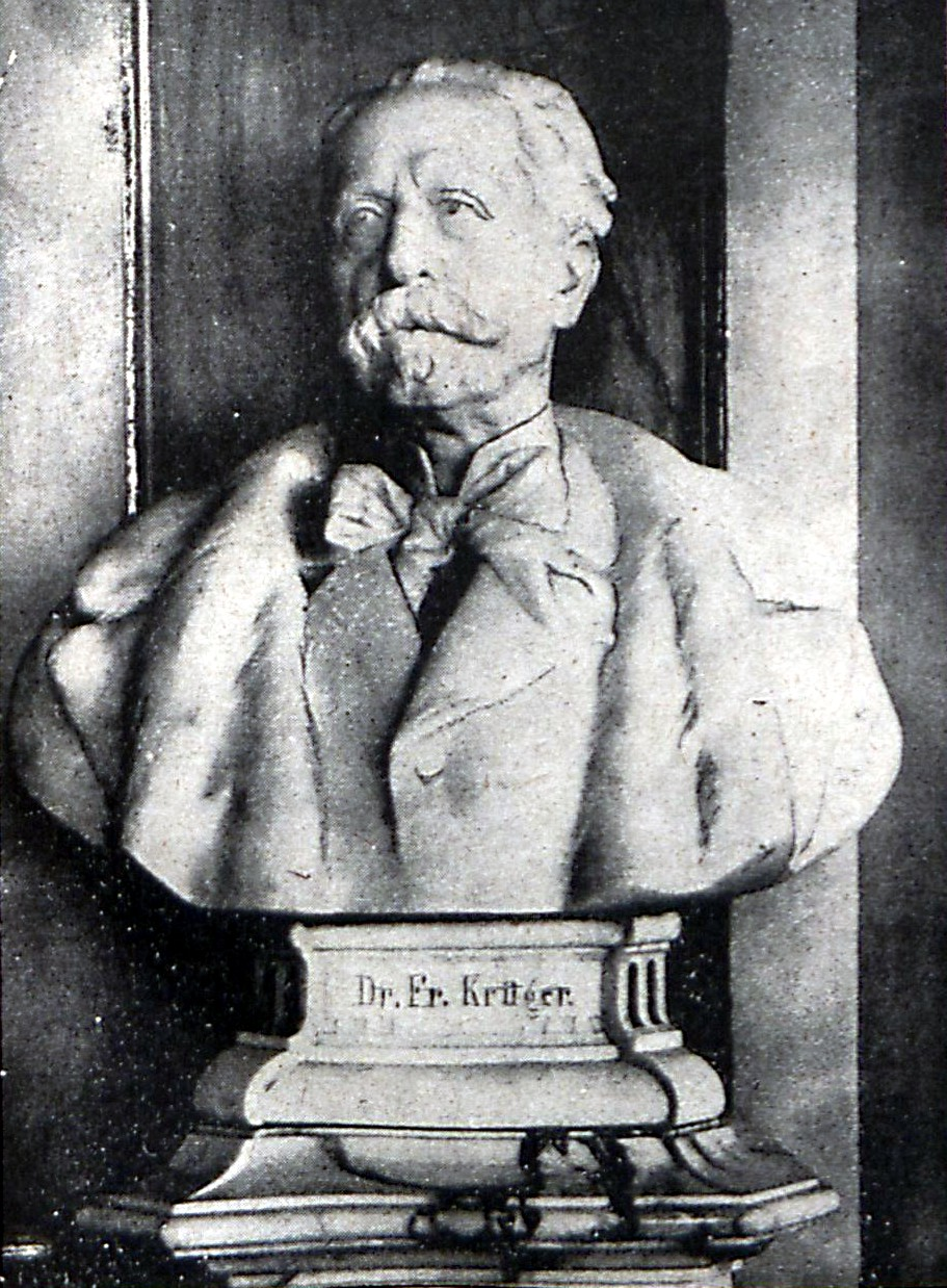 Minister Dr. Friedrich Krüger, Hanseatischer Gesandter. Marmorausführung der Büste im Ratssaal des Lübecker Rathauses